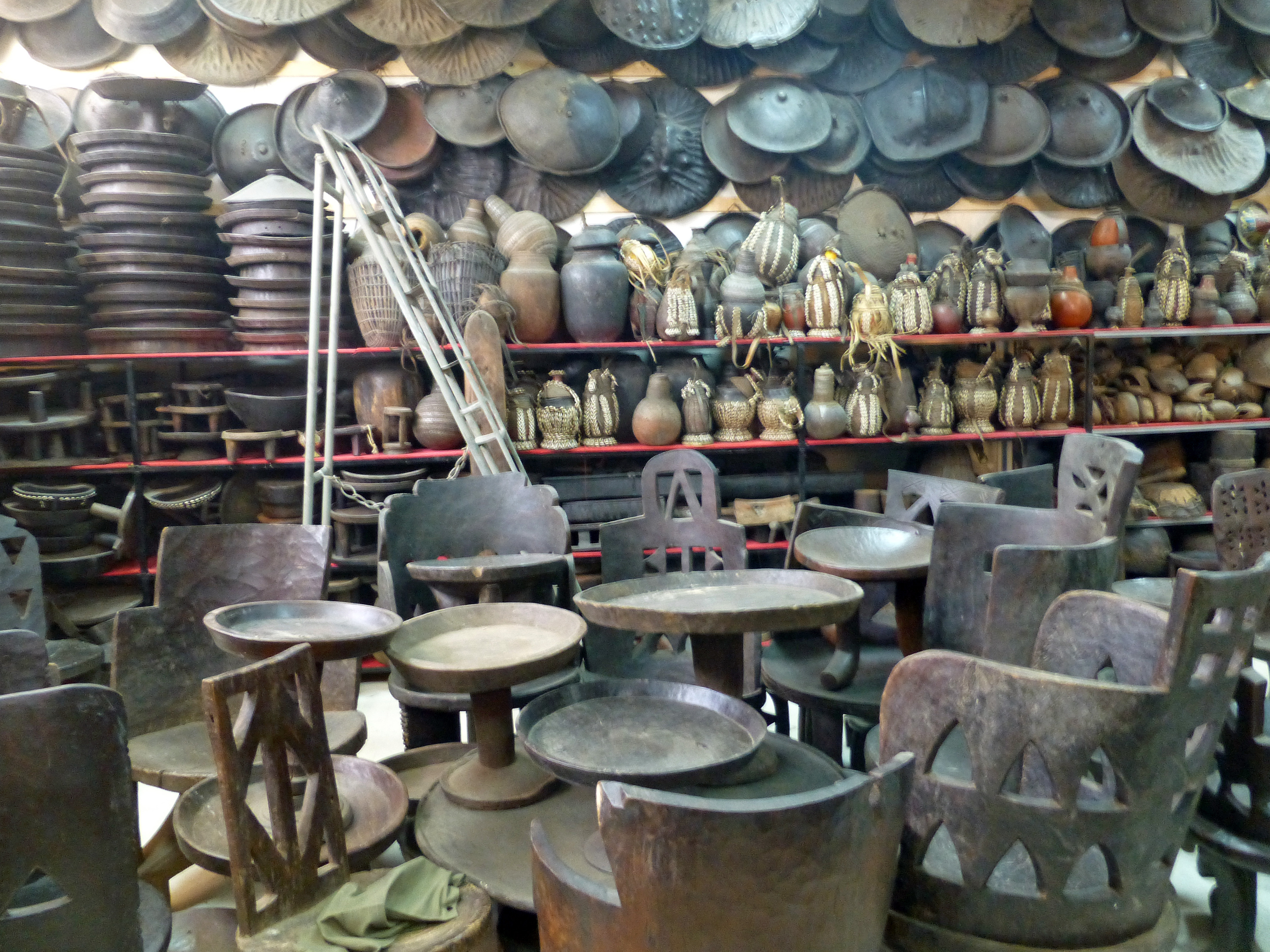 Magasin de souvenirs à Addis-Abeba (Ethiopie)